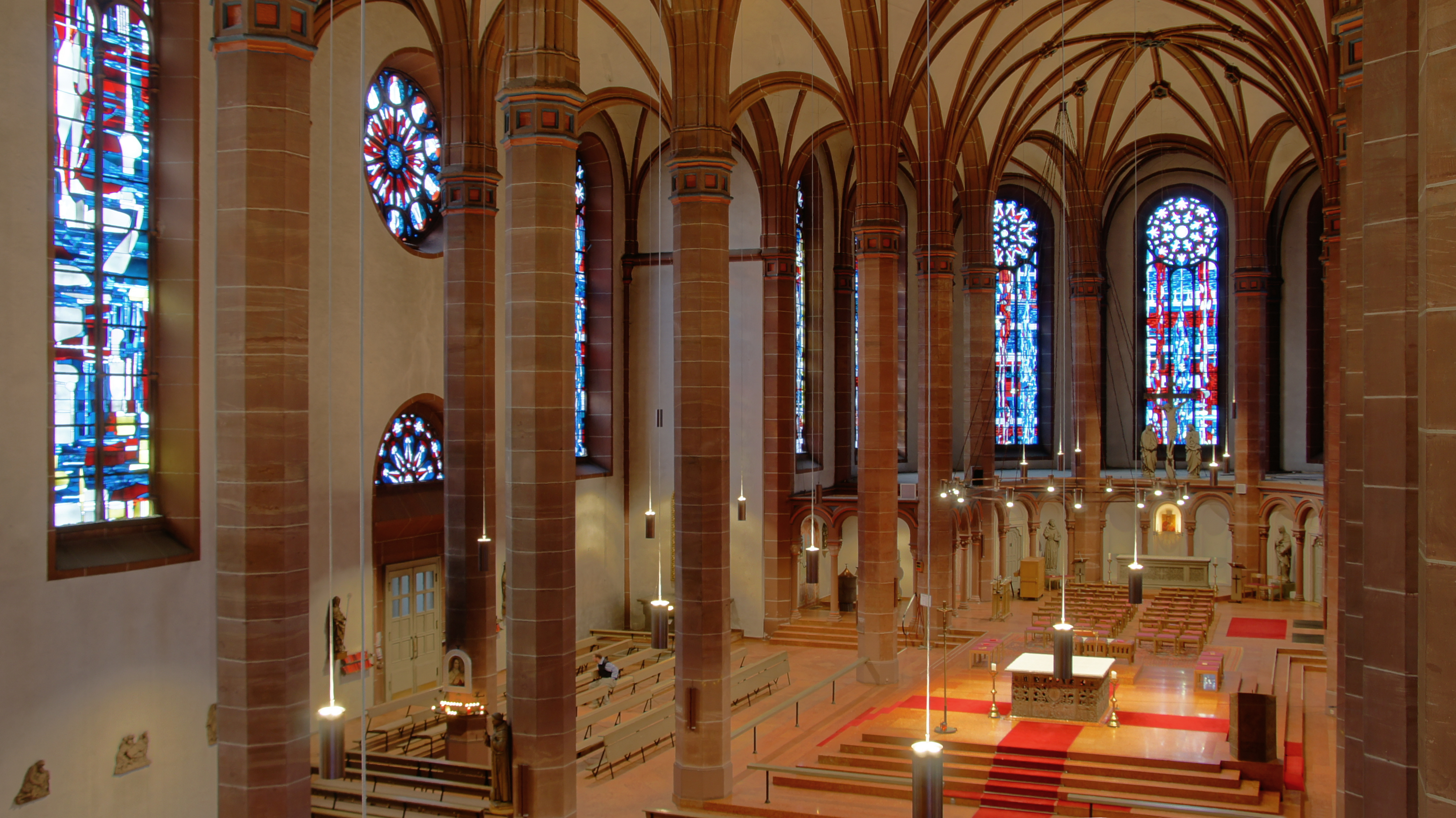 Innenansicht von der Orgelempore Richtung Altar